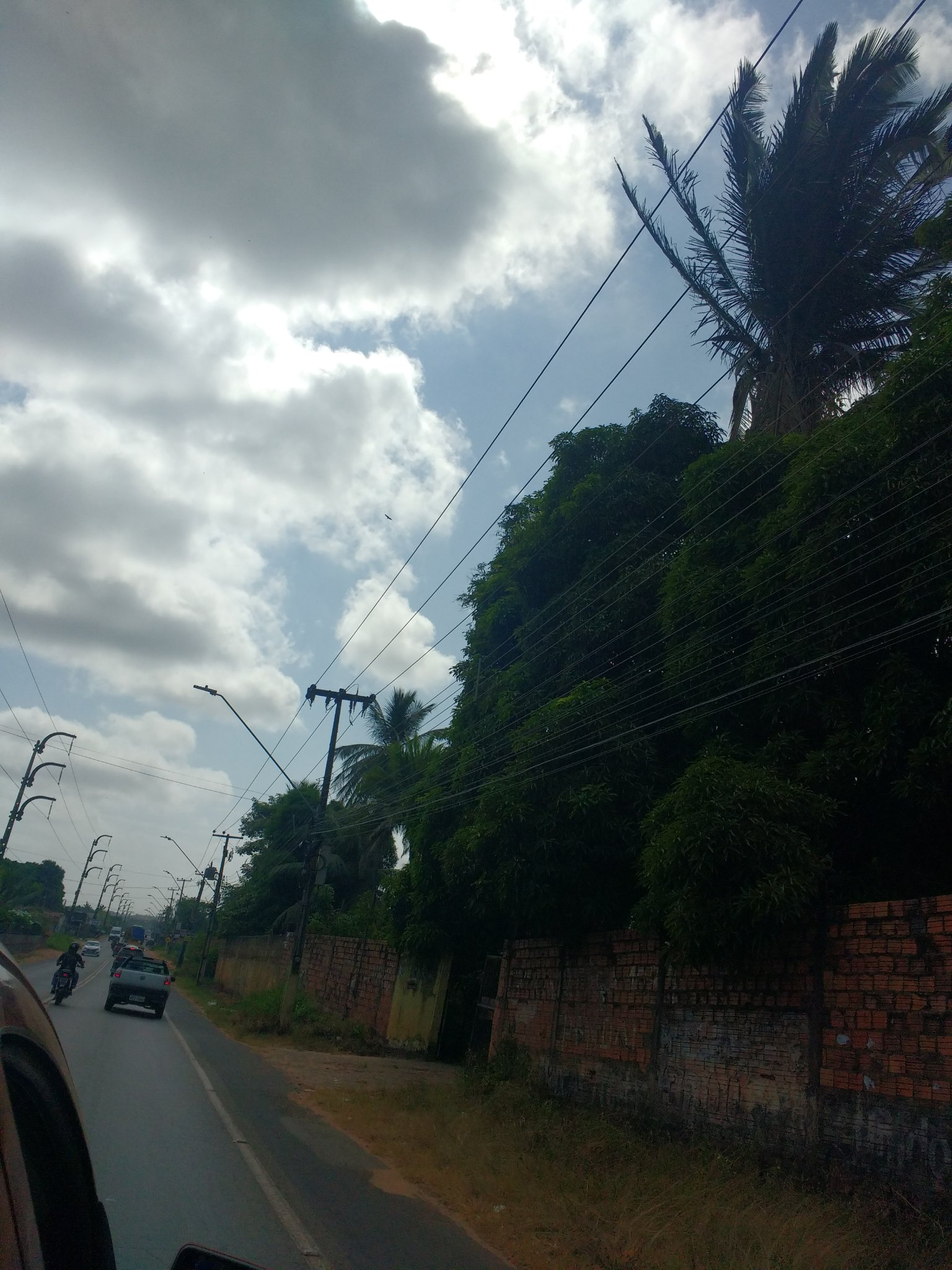 Rodovia estadual maranhense na Zona Metropolitana de São Luís